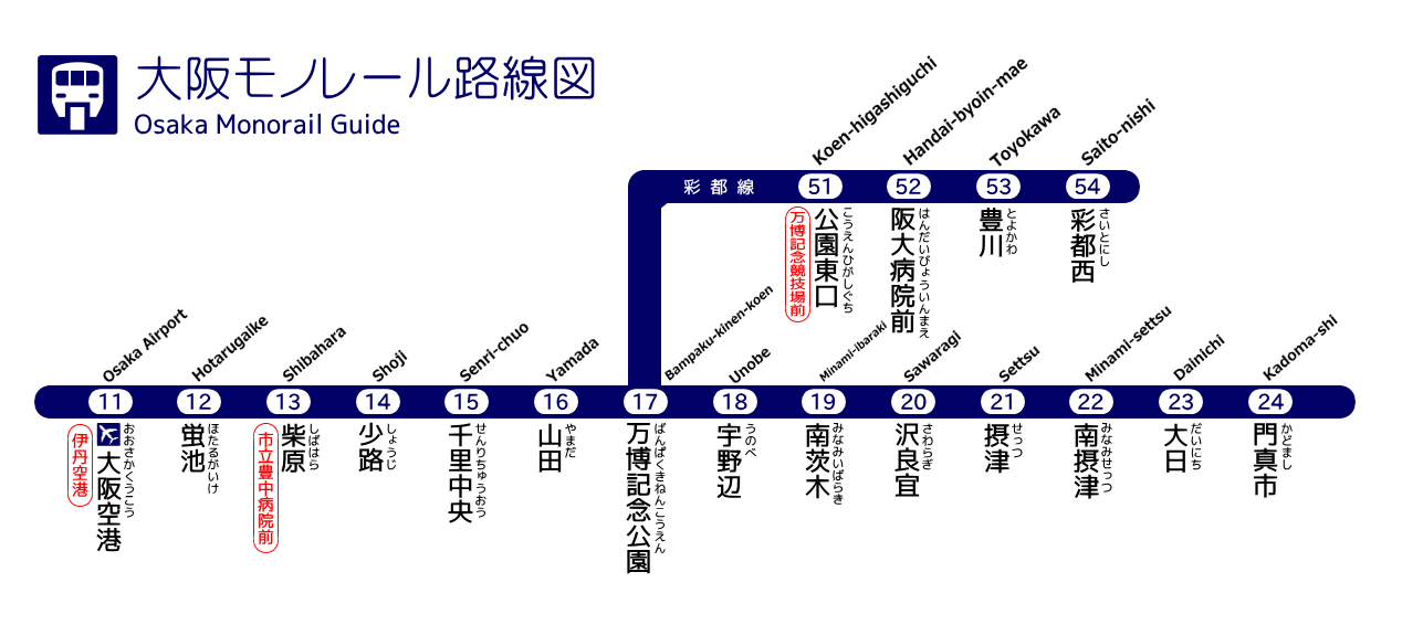 大阪モノレール路線図